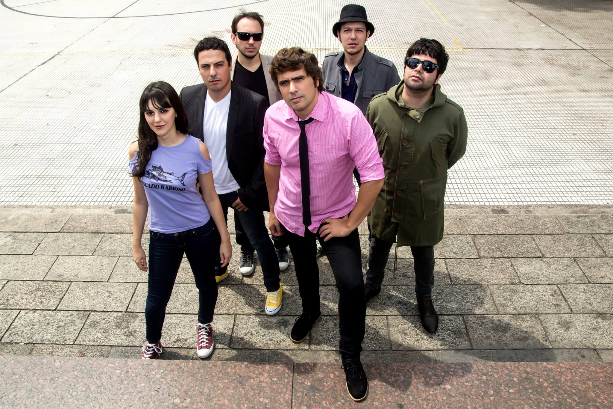 nubes